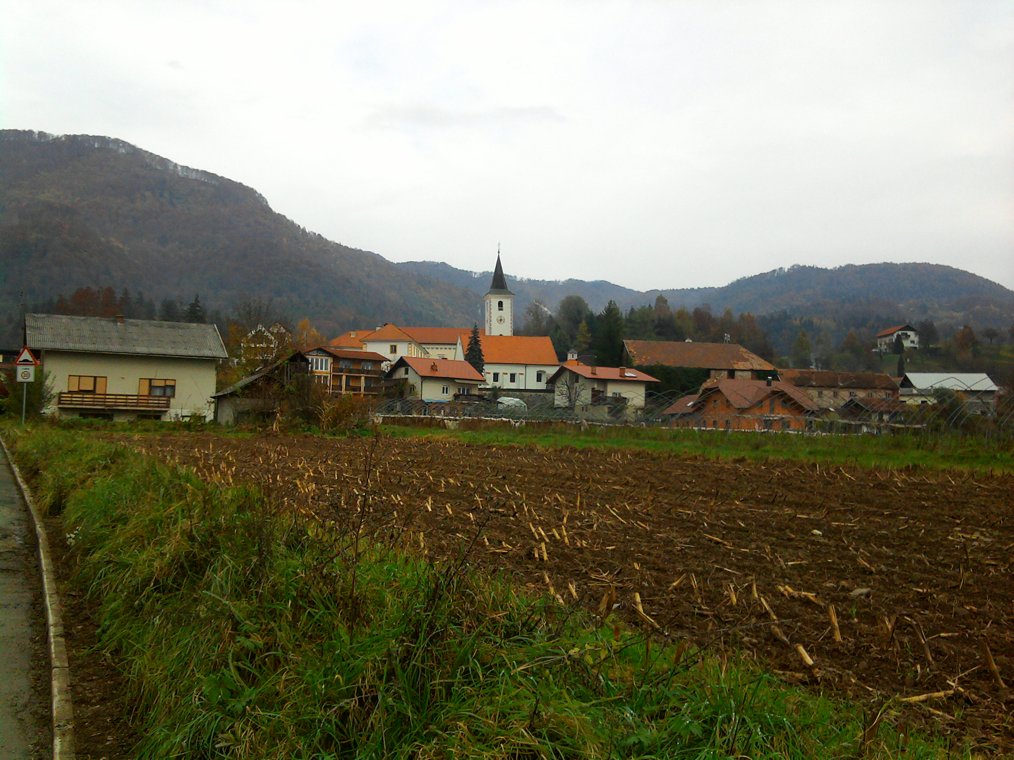 Loka pri Zidanem Mostu, Slovenia